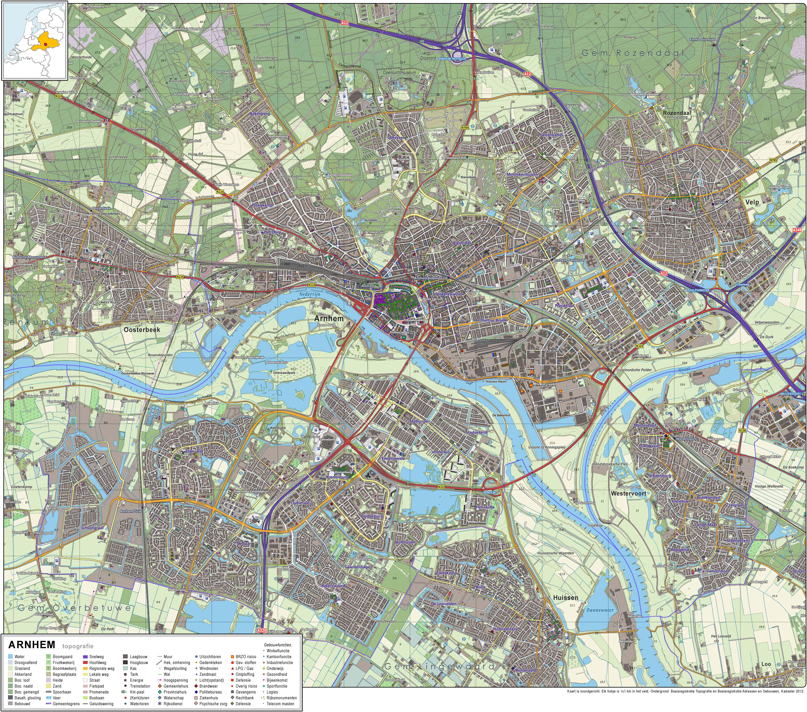 Topografisch beeld van de stad Arnhem. Op basis van de GML open geodata van de BRT/Top10NL (basisregistratie Topografie, Kadaster 2012), vrijgegeven door Kadaster op 30-11-2012 onder de Creative Commons BY licentie. Gebouwvlakken vanuit Open Geodata BAG extract (december 2012). Samenstelling en kleurenschema: Jan-Willem van Aalst, met QuantumGIS en Photoshop.